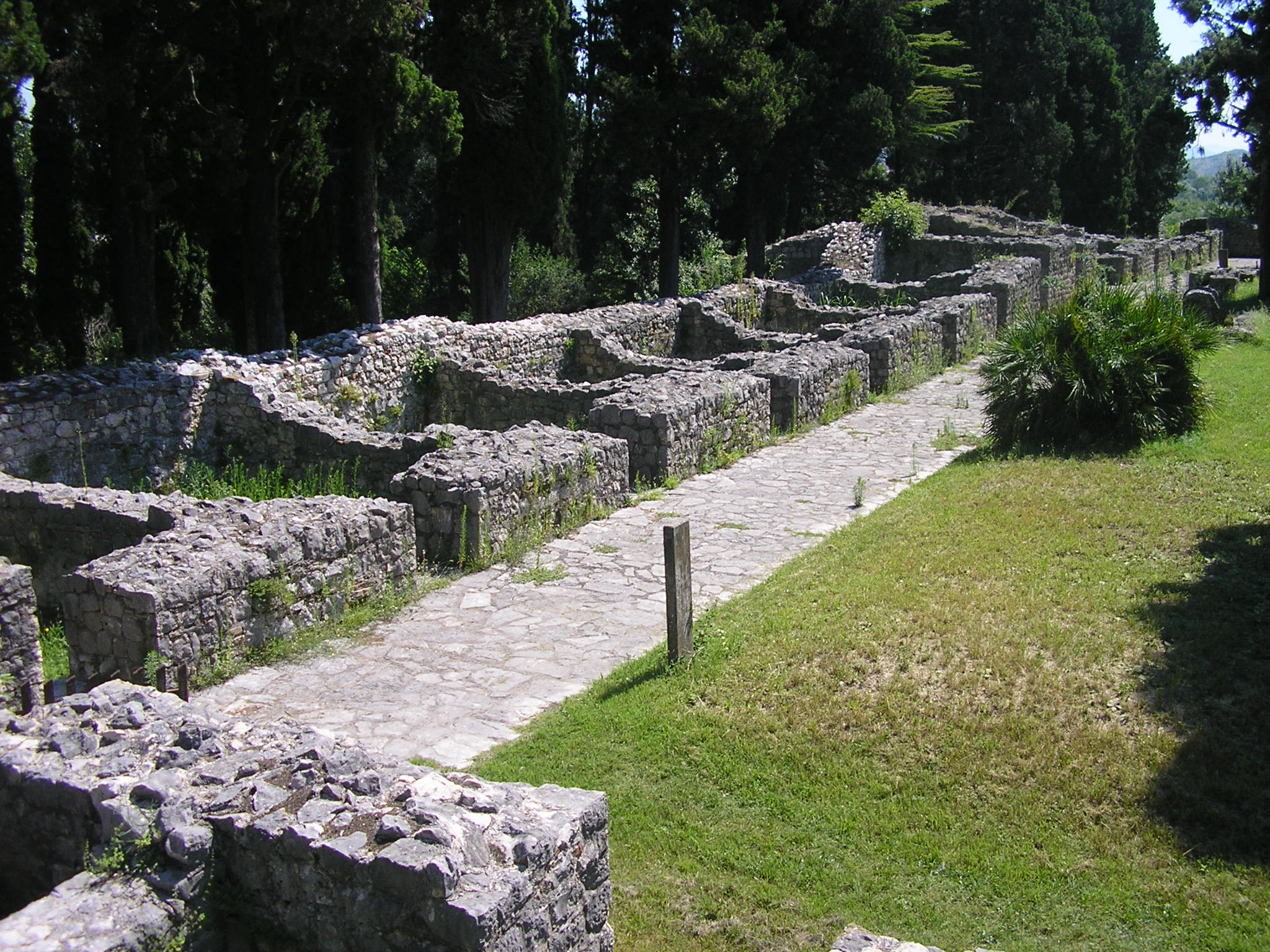 Detalj sa sjevernog zida